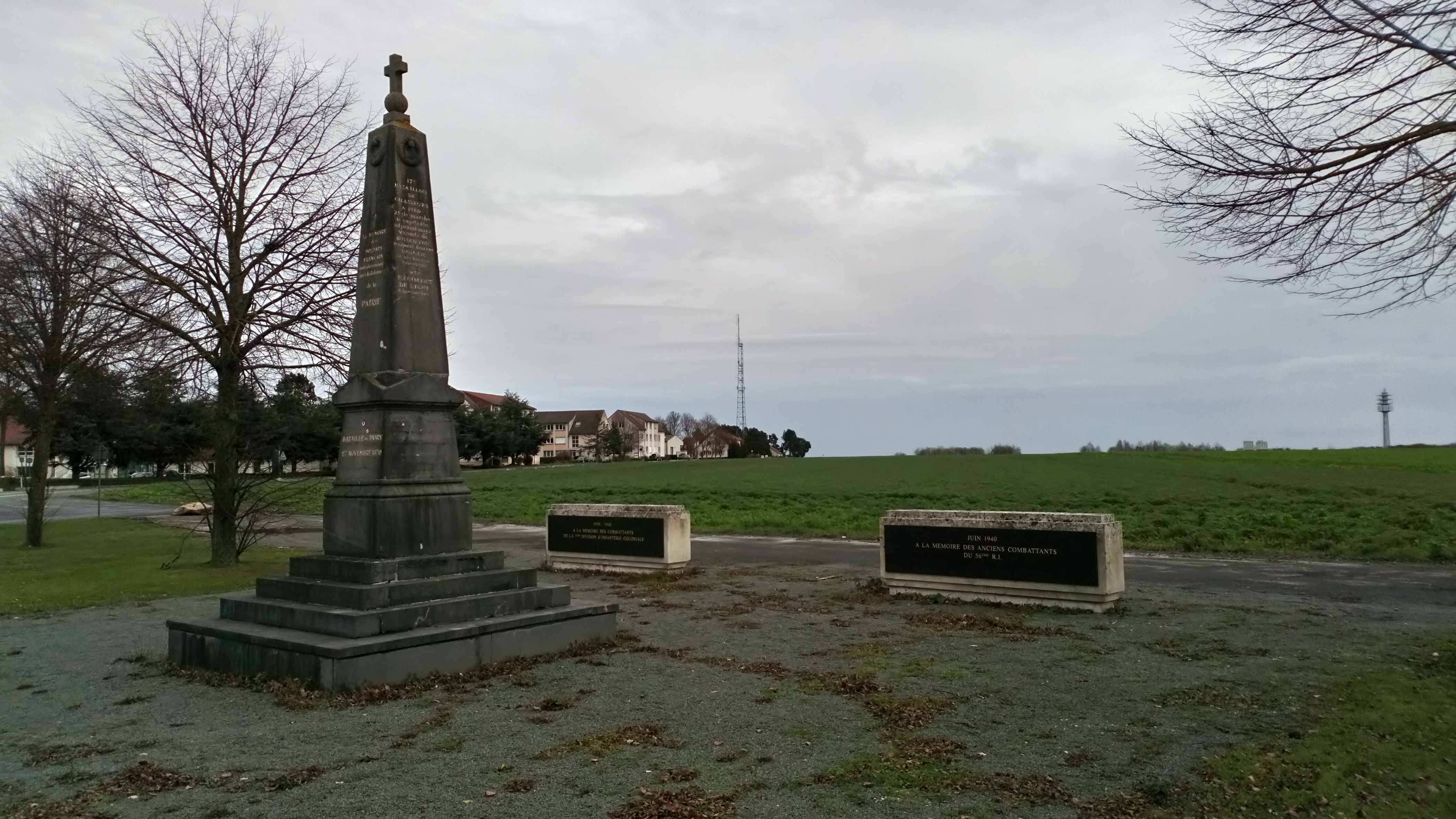 Monument bataille de Dury, 27 novembre 1870 6